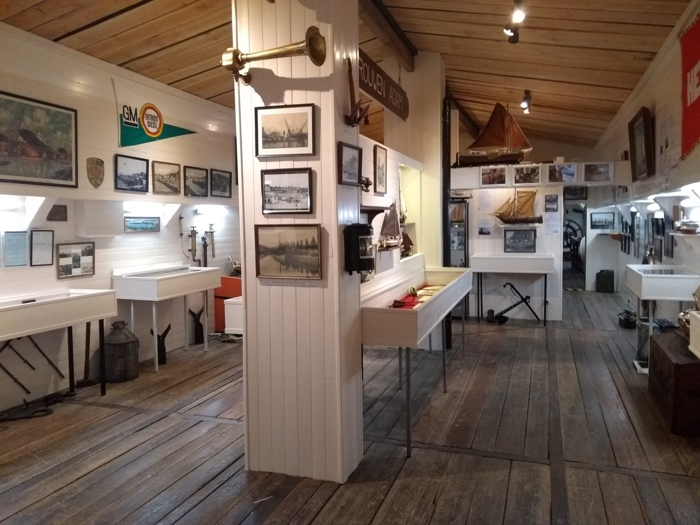 Museumschip Tordino als museum in 2018 te Beernem